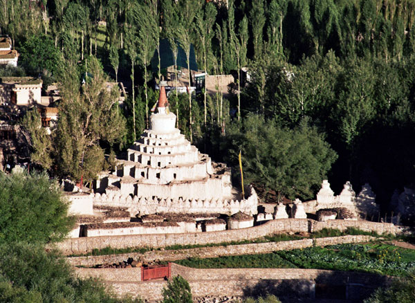 Leh. Chorten de Changspa (Ladakh, Índia)